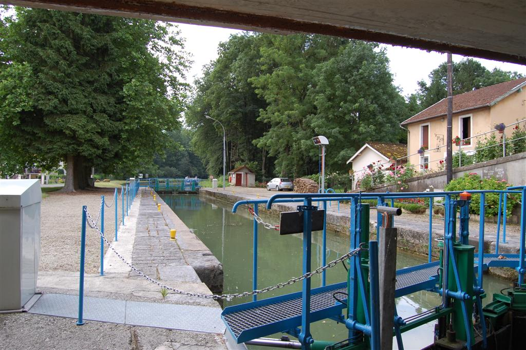 Sluis nr.31 in het Canal-de-l'Est-branche-Nord te Stenay